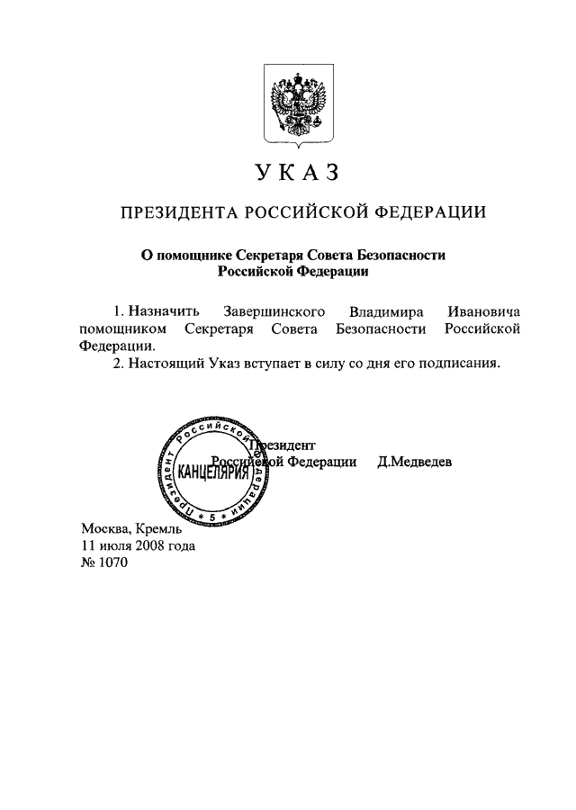 Copie scanée de l'Oukase du président Medvédev portant sur la nomination de M. Zaverchinsky comme conseiller du secrétaire du Conseil de sécurité de Russie